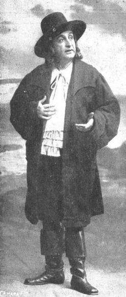 El actor español Emilio Thuillier en la obra de teatro La ciudad alegre y confiada (1916), de Jacinto Benavente